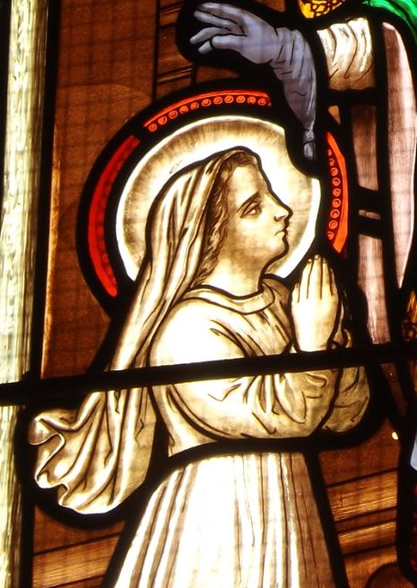 Vitrail de Estelle de Saintes dans l'église des Mathes.